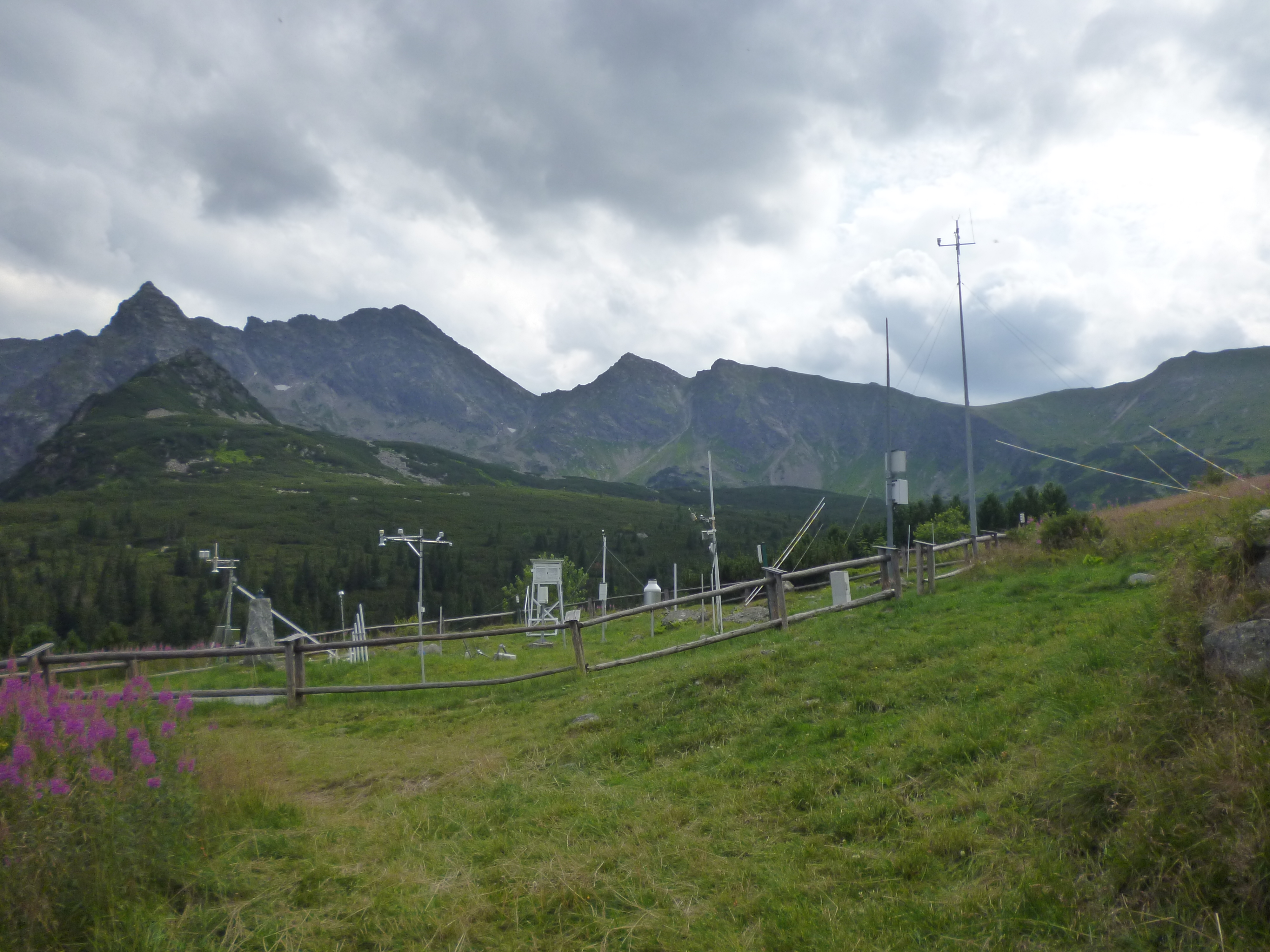 "Stacja Badawcza im. M.M. Kłapów IGiPZ PAN" znajduje się na Hali Gąsienicowej powyżej schroniska na Murowańcu w Tatrach